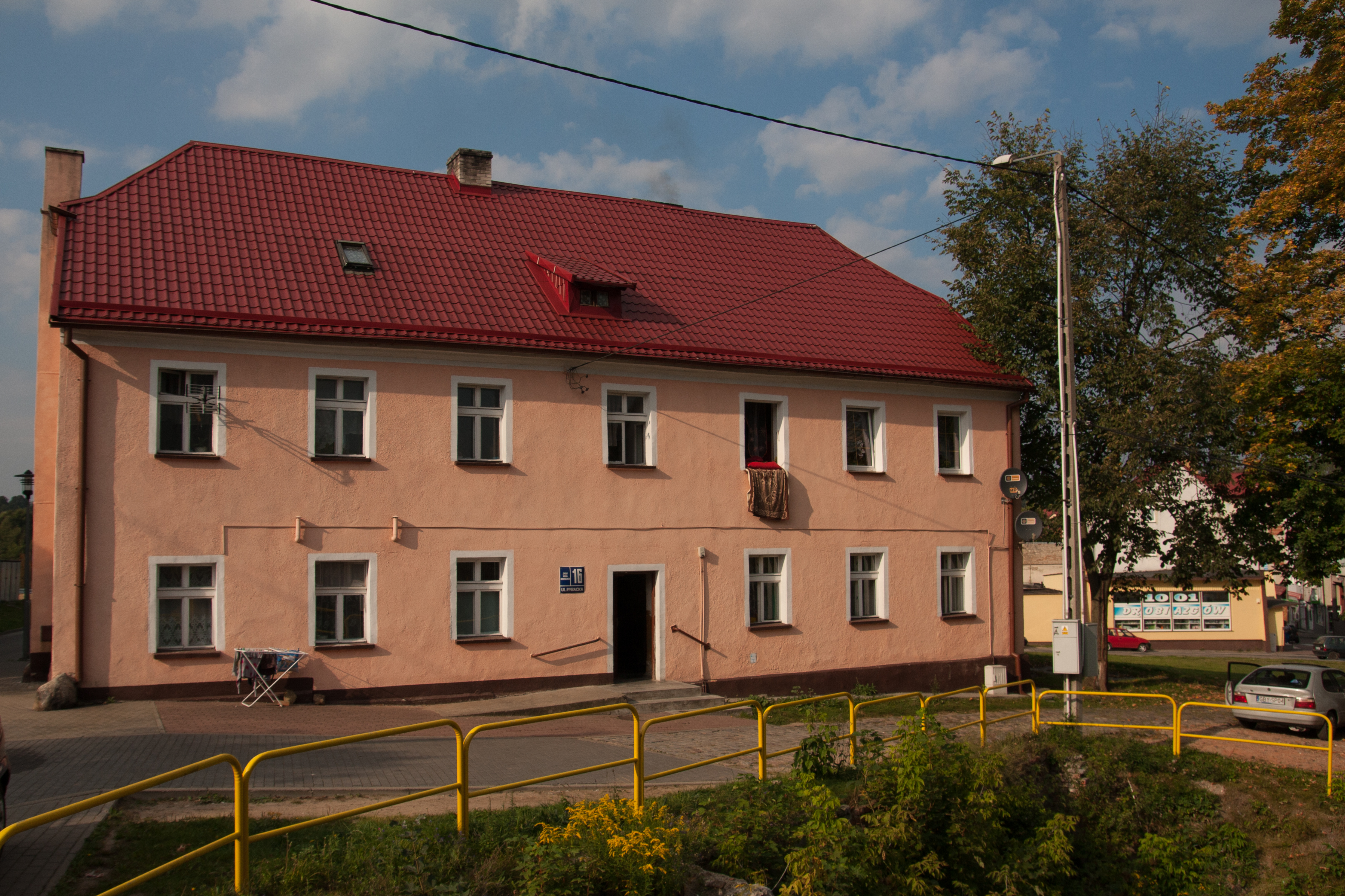 Miastko, ul. Rybacka 16 - budynek gospodarczy, kon. XVIII